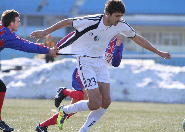 Milan Jagodic u prodoru.